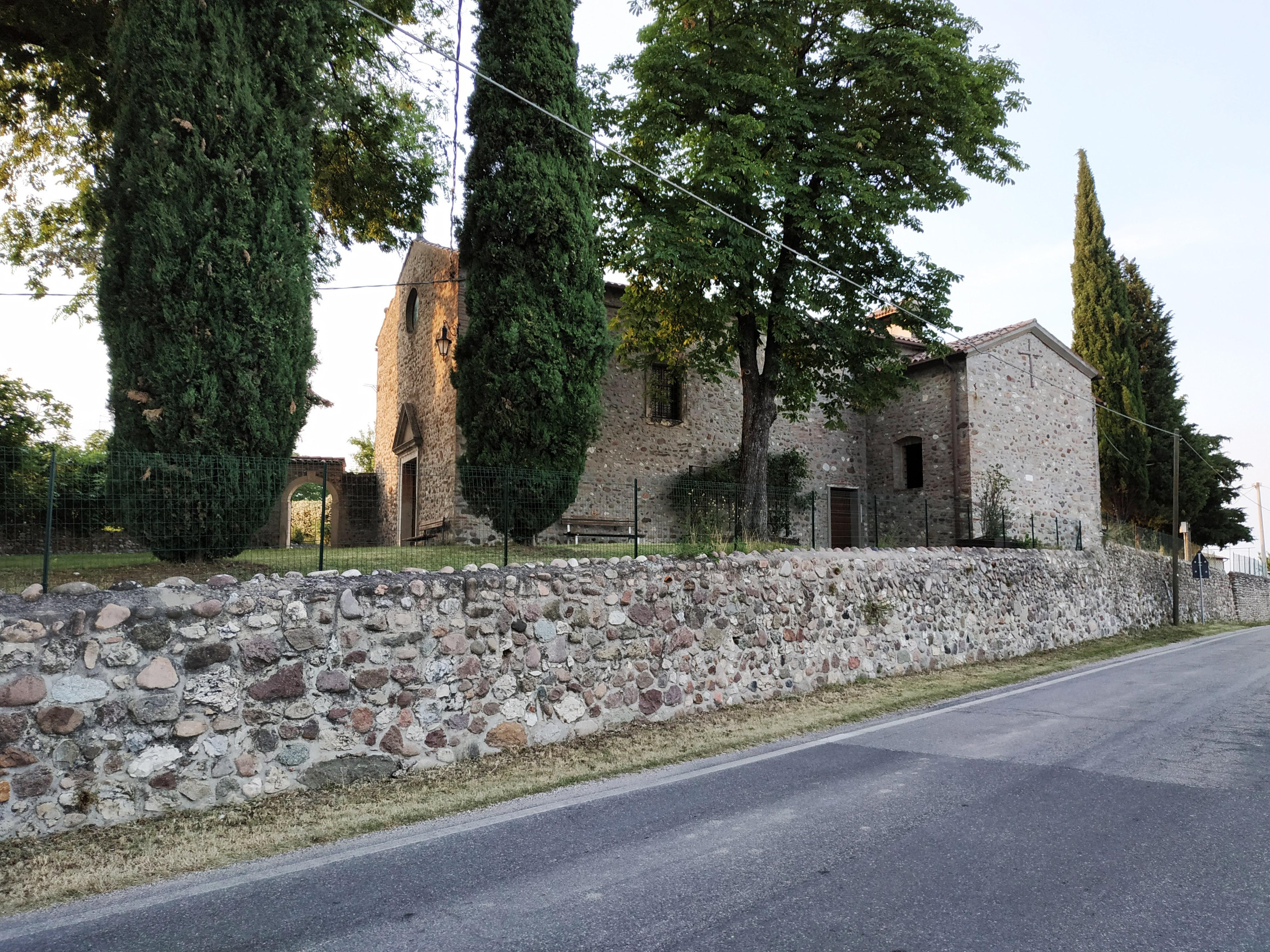 Vista della facciata e della parte antistante della chiesa di San Rocco in località Rosolotti, comune di Sona